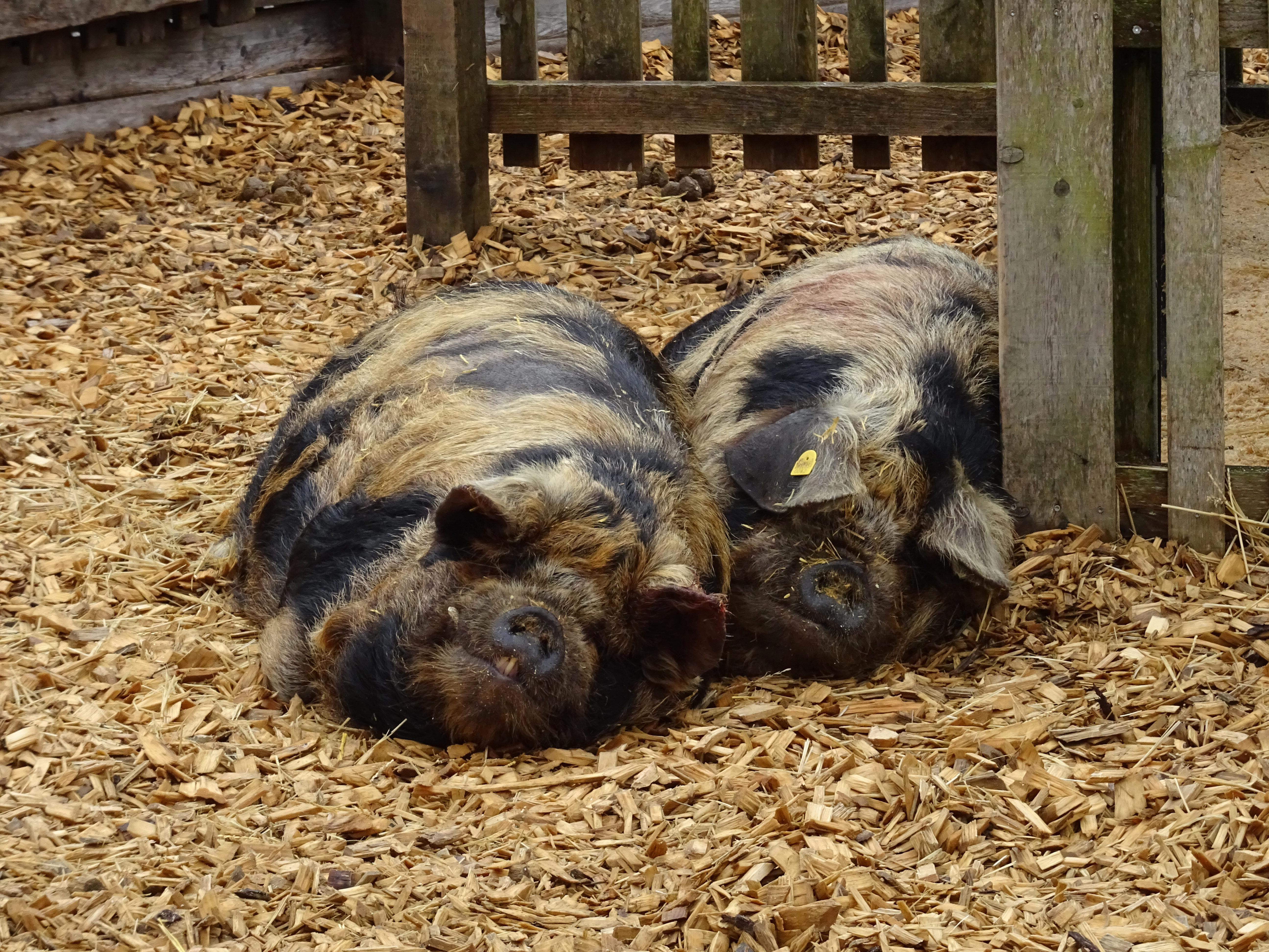 Kune Kune Schweine auf Gut Aiderbichl, Henndorf am Wallersee (Flachgau)